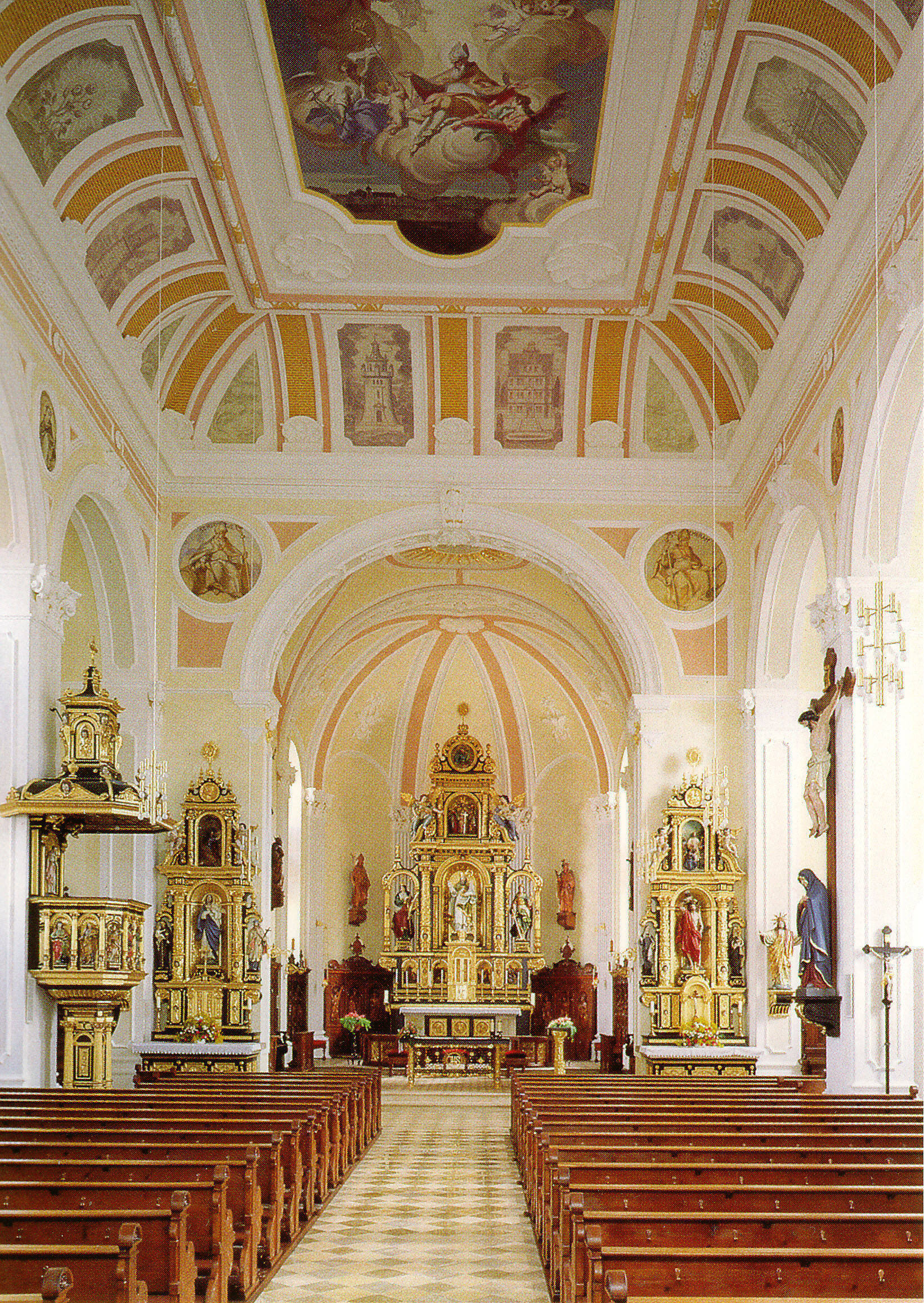 Innenansicht der St.-Nikolaus-Kirche Siegenburg